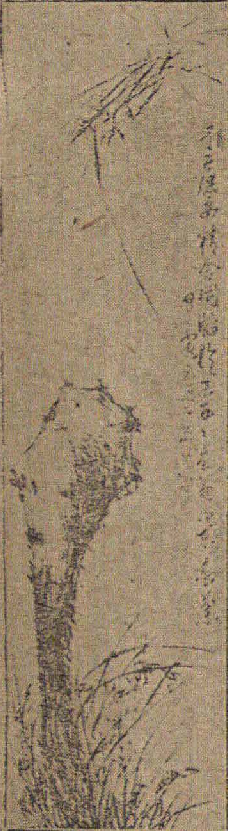 민원식 작, 묵죽도 (1914)